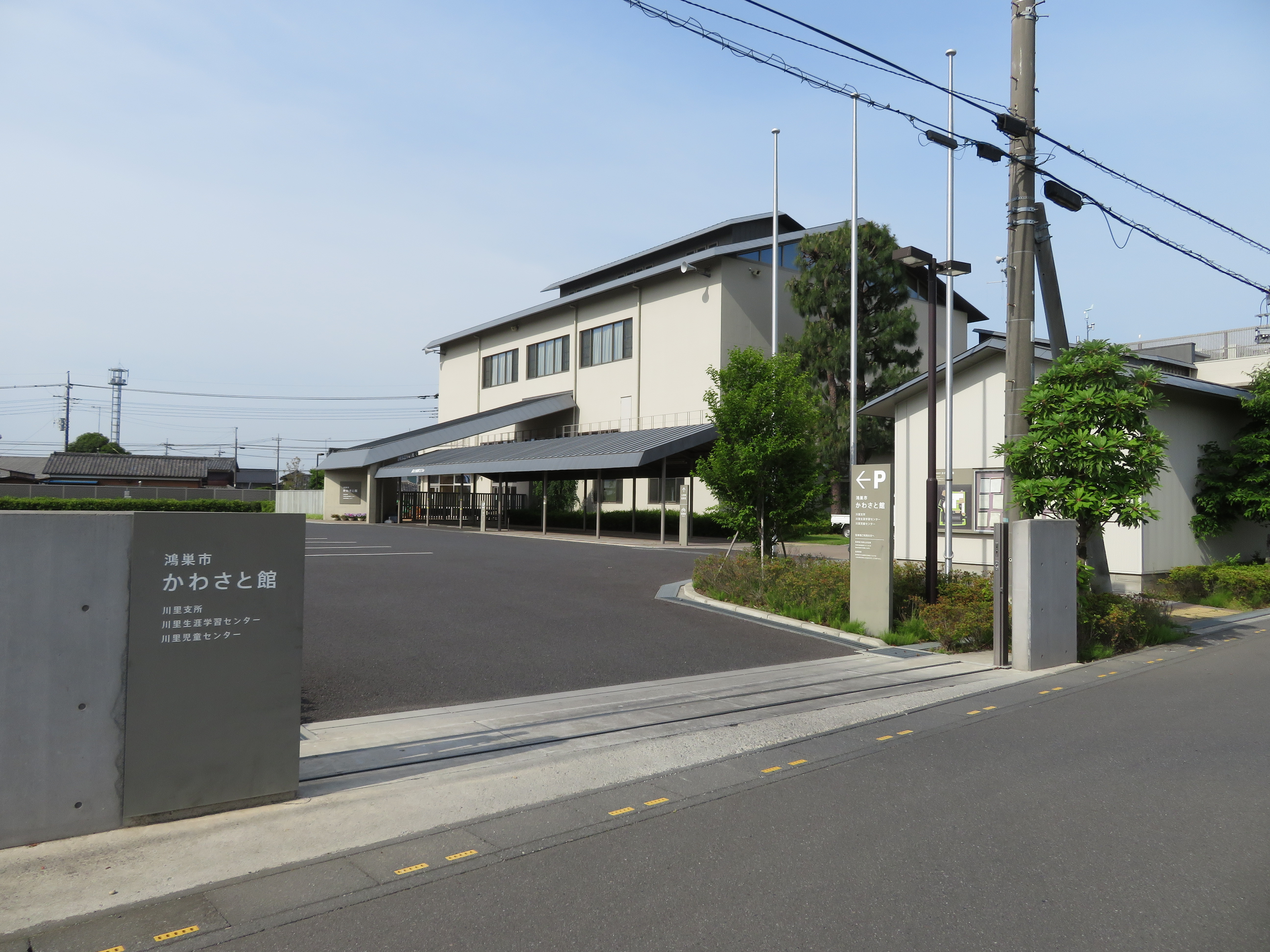 鴻巣市かわさと館（鴻巣市役所川里支所、川里生涯学習センター、川里児童センター） Canon PowerShot SX720 HS